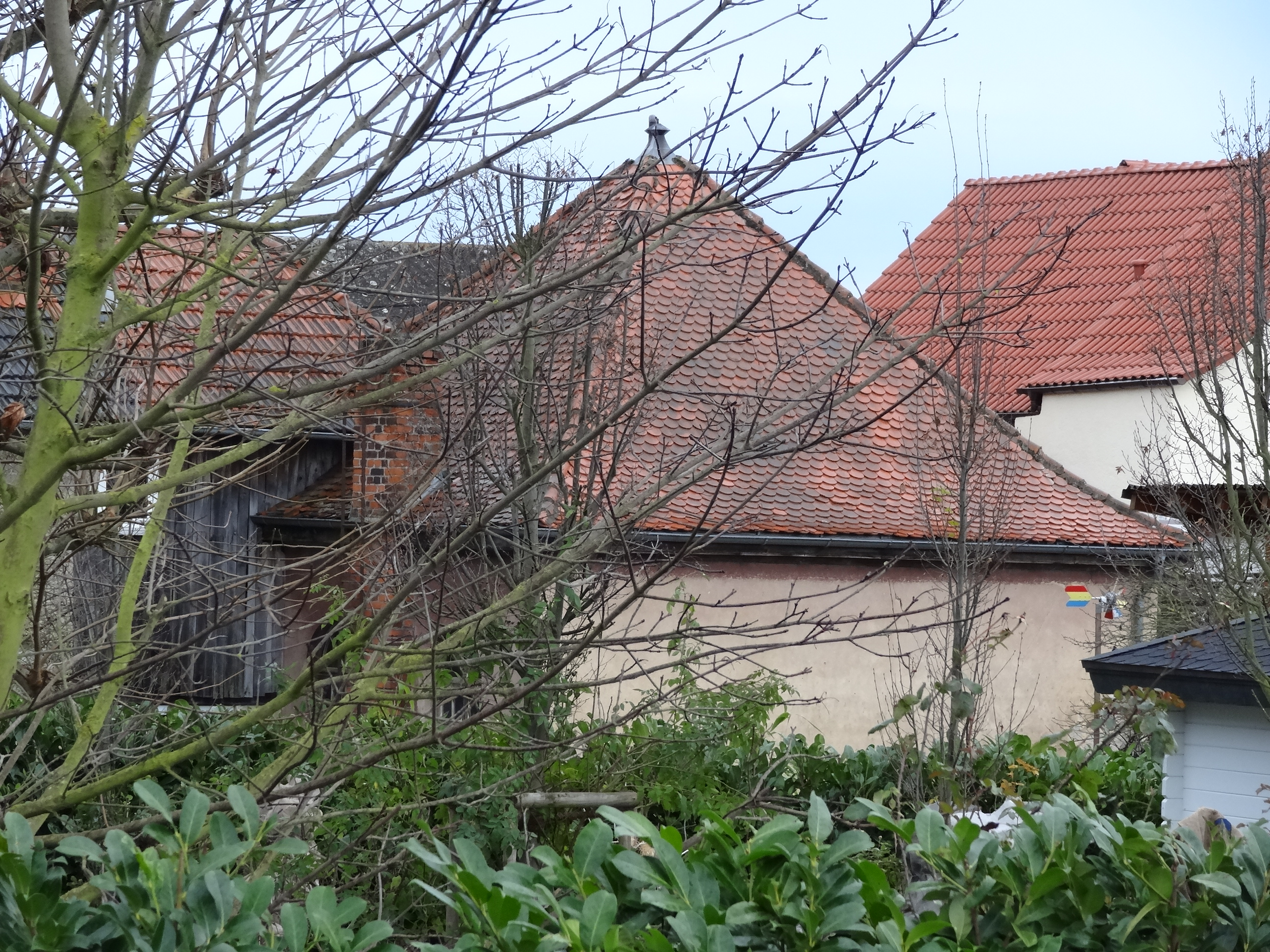 Ehem. Synagoge Pohl-Göns